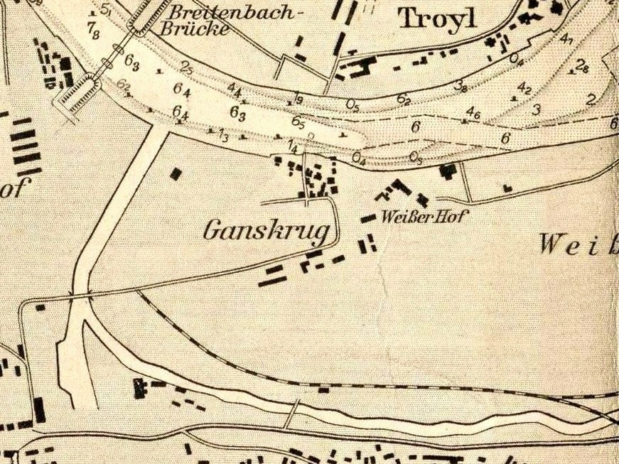 Danzig Ganskrug und Weisser Hof.